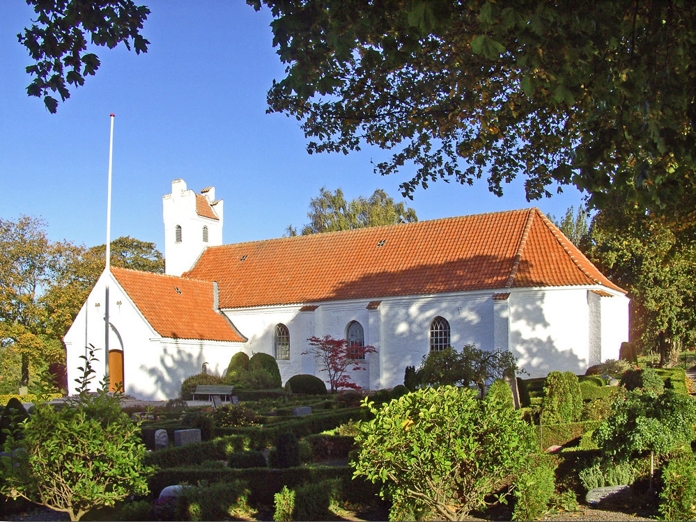 fra sydøst